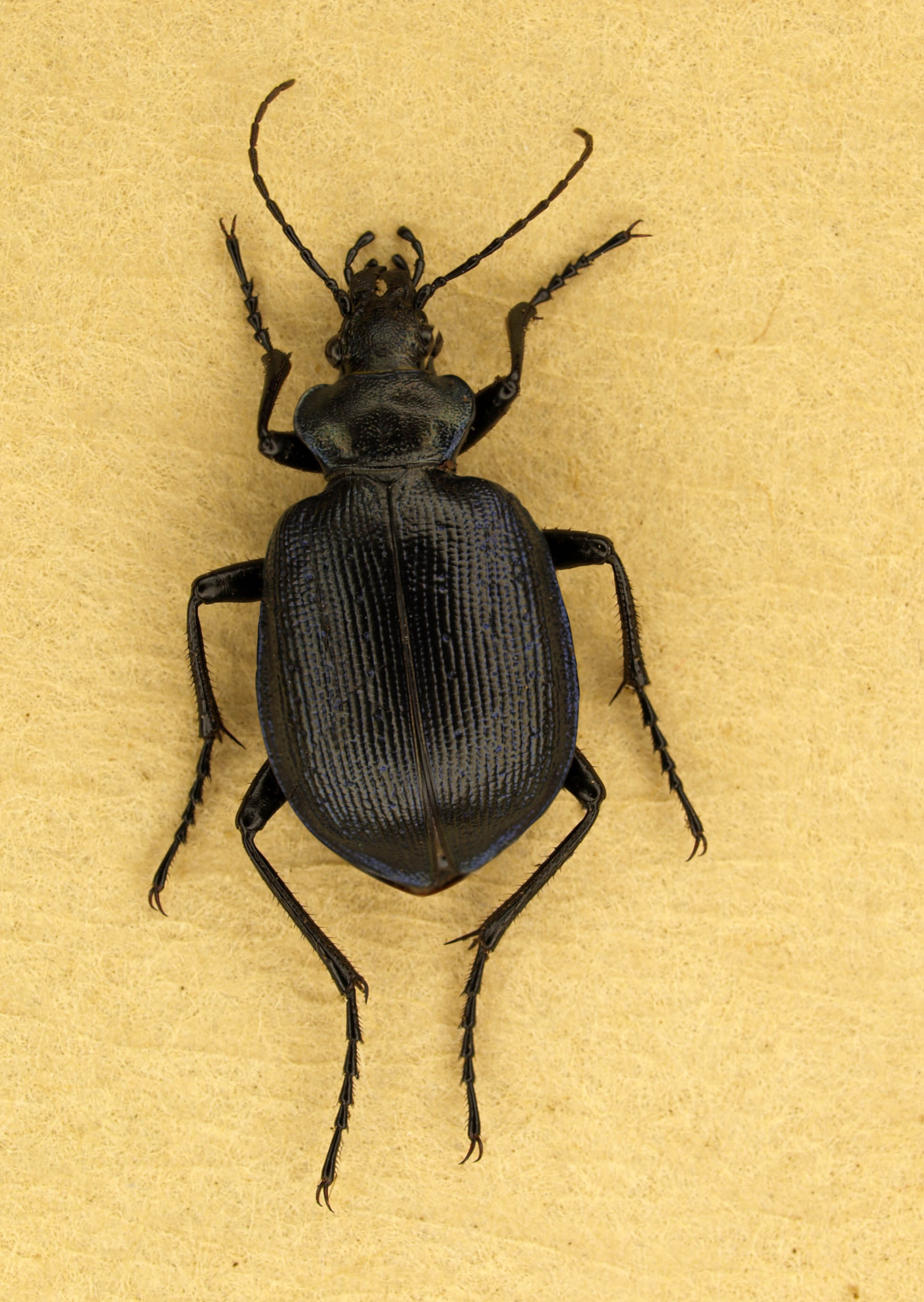 Calosoma inquisitor, gevonden 18 mei 2007 Drie, natuurcamping staatsbosbeheer.